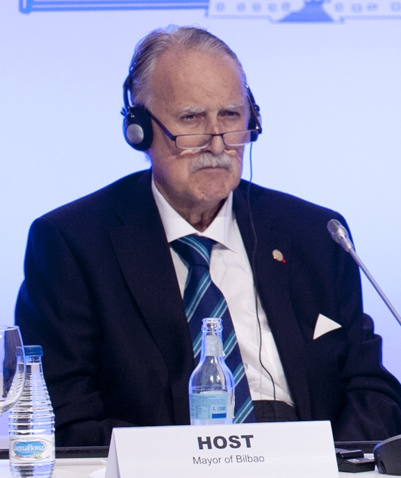 Acto de clausura del Foro Mundial de Alcaldes